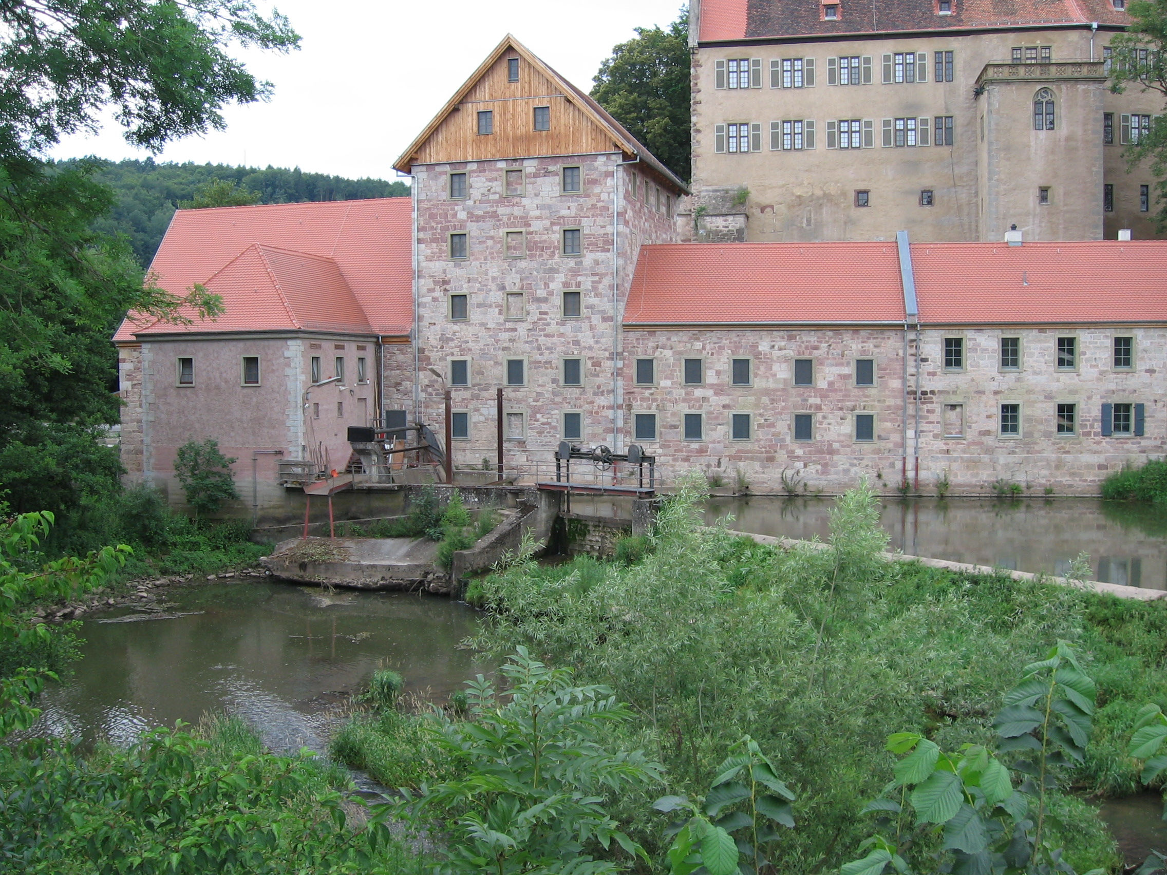 Mühle und Schloss (Aschach/Ufr.)